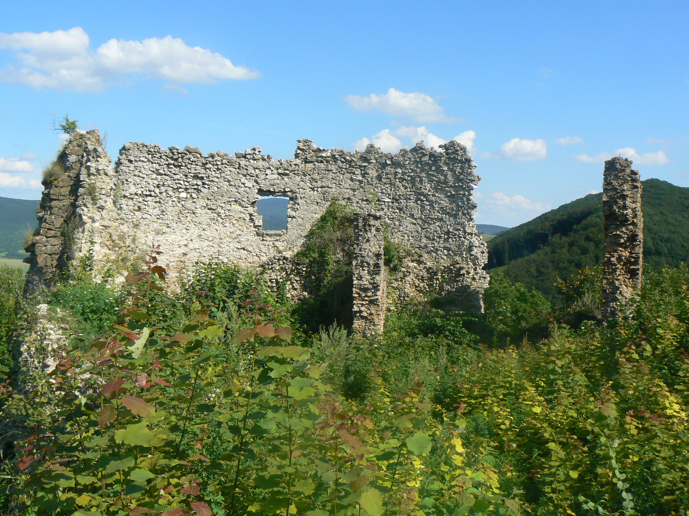 Jasenovský hrad - zrúcanina hradu.